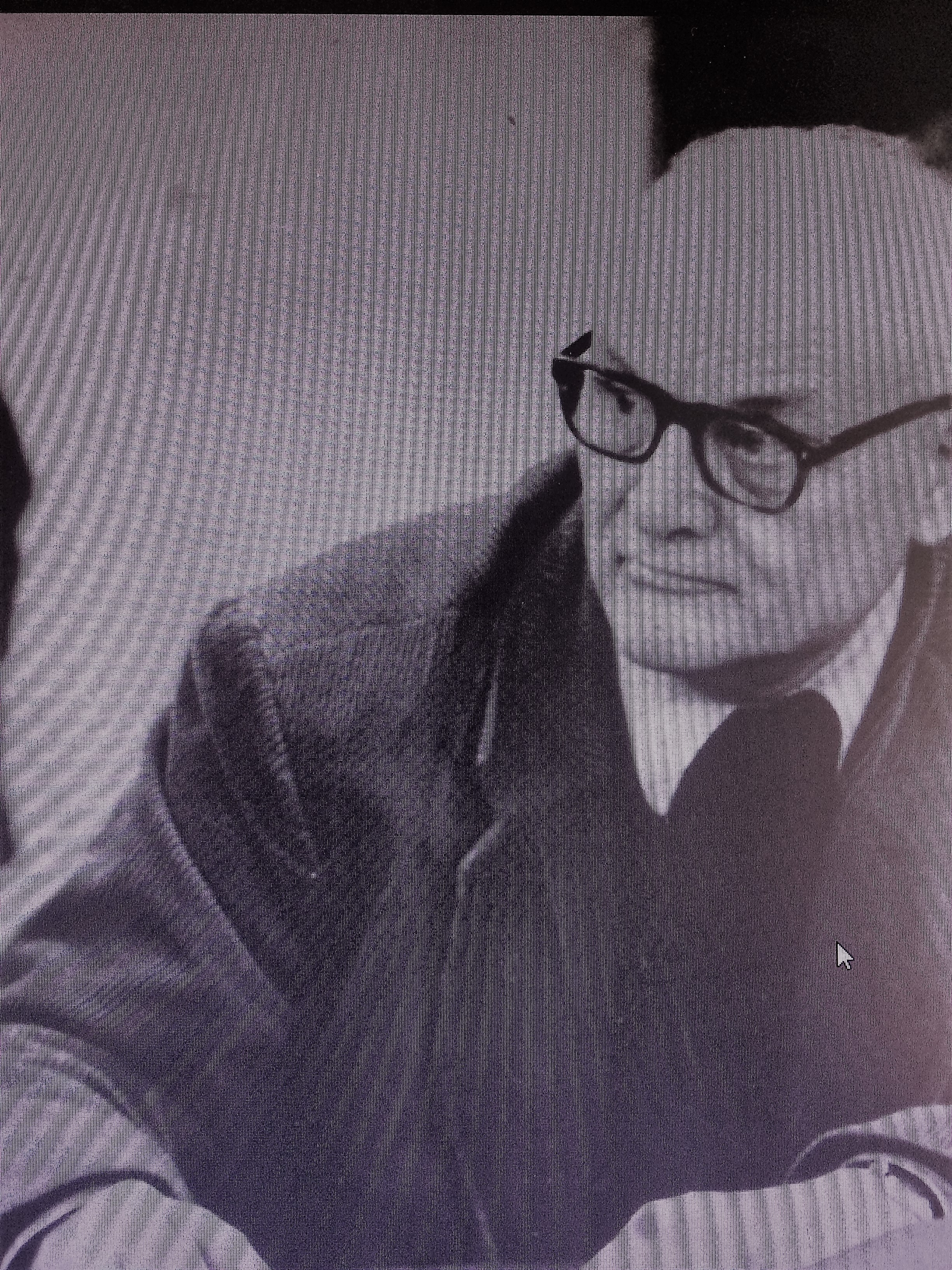 Aldo Crivelli negli anni 70